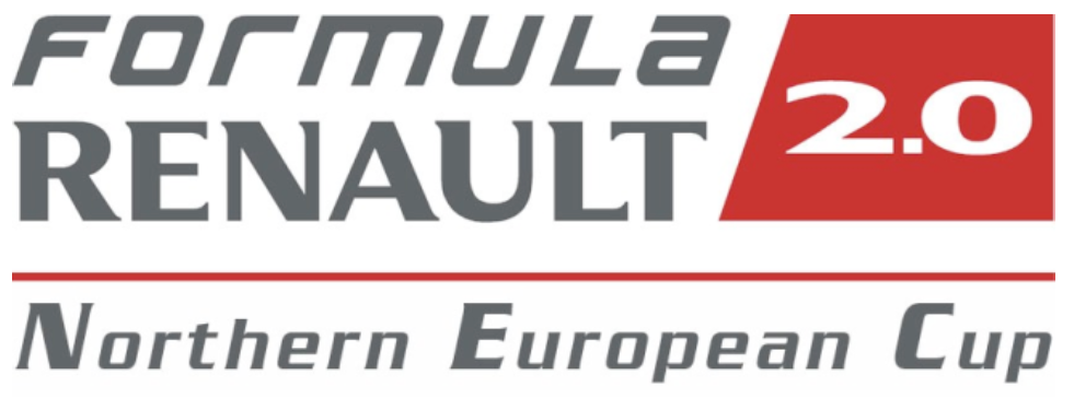 Logo des Formula Renault 2.0 Northern European Cup